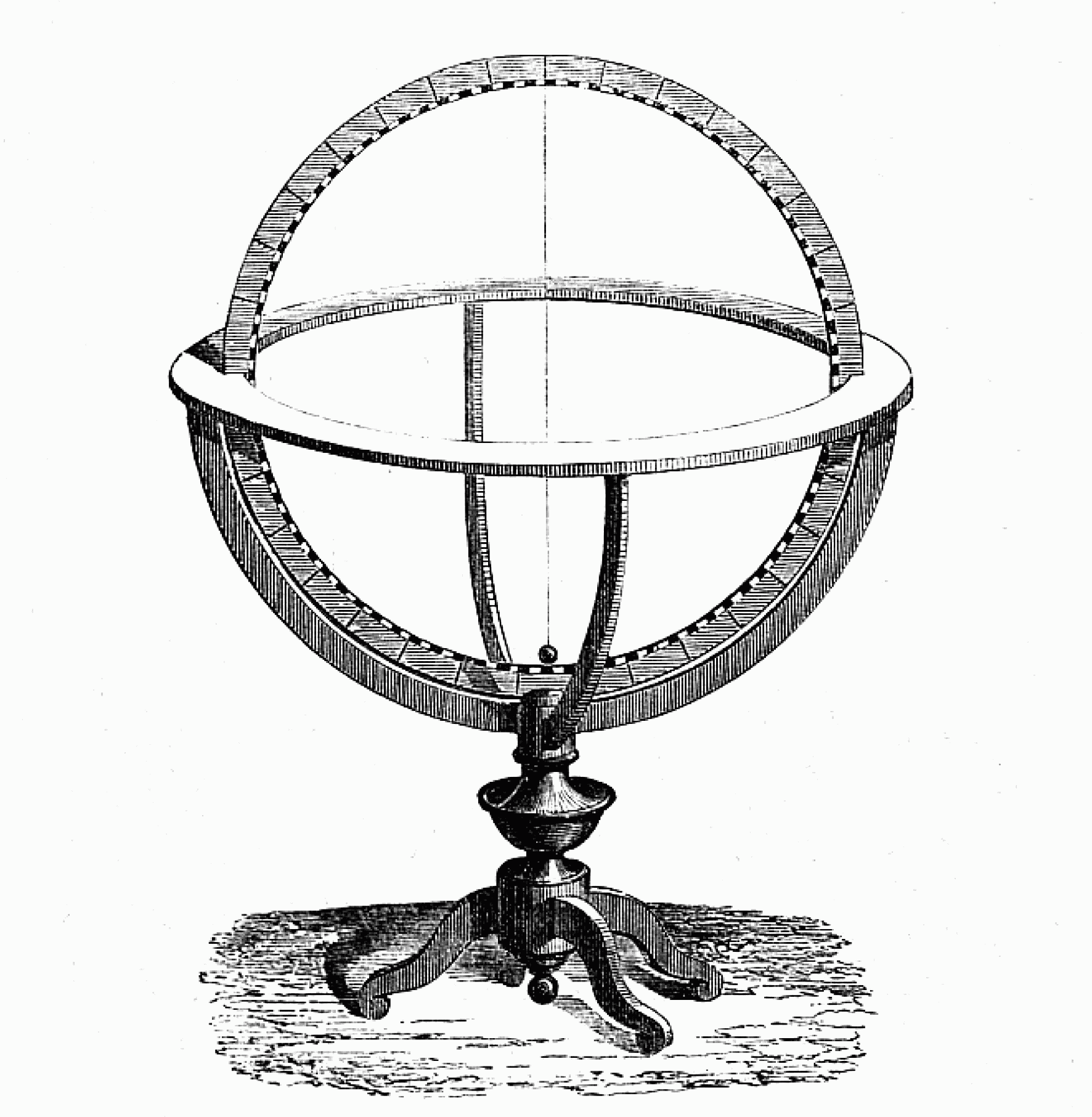 Fig. 356. — Armille.